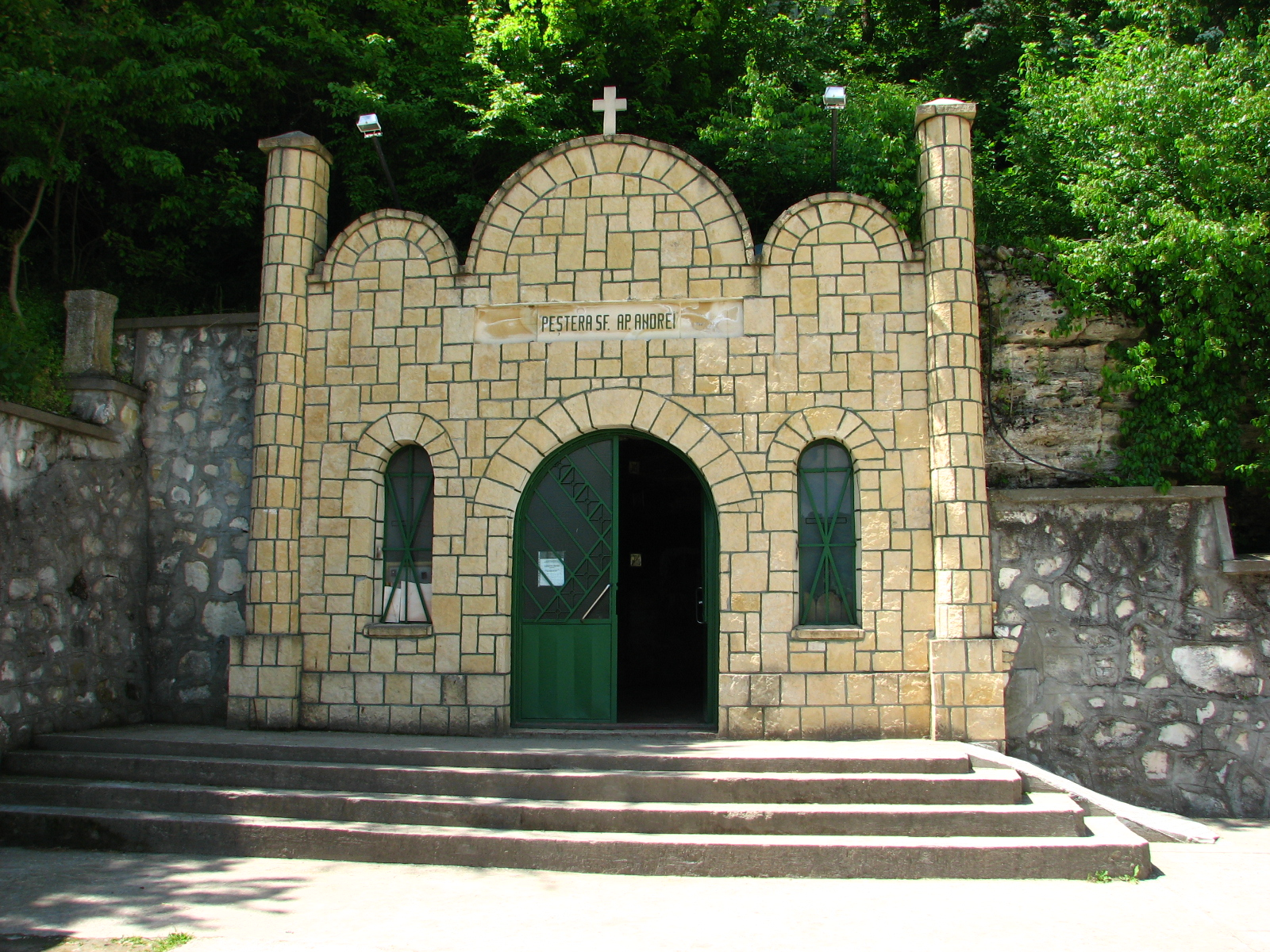 Peșterile Sf. Apostol Andrei, Ioan Corvin, Constanța, Dobrogea